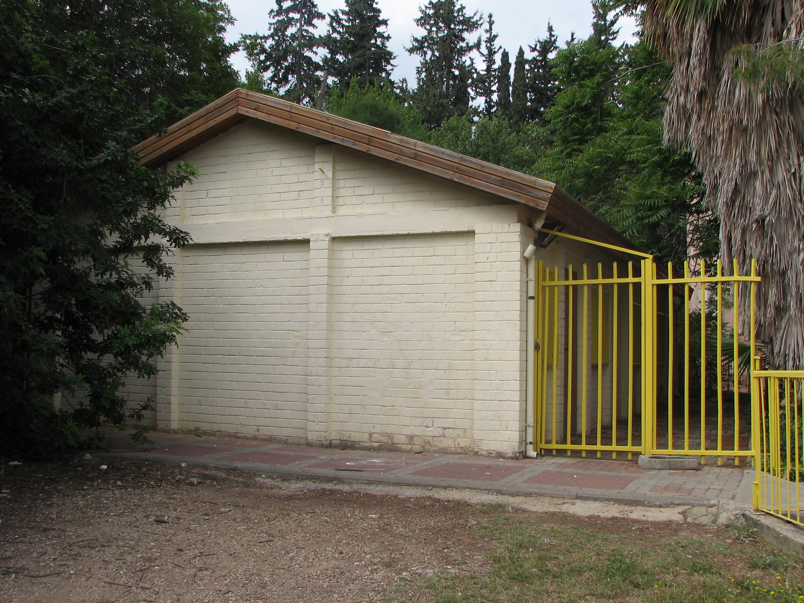 The elementary School, "Beit Yehoshua" in Nesher was founded in 1928 as a school for the children of the workers at the Nesher cement factory. Later, the school was renamed in commemoration of Gen. Yehoshua Globerman, a member of Kibbutz Yagur. This school changed rooms several times. The school Initially had a few classrooms near the old quarry. In 1933 a school building was inaugurated near the cement factory. Following the migration of population and the removal of the barracks neighborhood north of Nazareth-Haifa road the school move to the current location into this former Nissen hut. This is the only building left of the British Army camp. בית הספר היסודי בנשר בית יהושע נוסד בשנת 1928 כבית הספר לילדי עובדים ליד מפעל המלט נשר. לאחר מותו במסגרת פעולות הנצחה של האלוף יהושע גלוברמן בן קיבוץ יגור, שונה שמו של בית הספר. מבנה בית הספר הוחלף מספר פעמים. בתחילה נבנו נספר כיתות באזור המחצבה הישנה. בשנת 1933 נחנך מבנה בית ספר ליד בית החרושת למלט. בעקבות נדידת אוכלוסיה וחיסול שכונת הצריפים שמצפון לכביש חיפה נצרת הועבר בית הספר למבנה הנוכחי במקום בו שכן בעבר מחנה צבא בריטי בצריפי ניסן. מבנה אחד שרד בשטח בית הספר. גגו הוחלף מגג פחי עגול לגג רעפים. הקירות המקוריים עומדים על תילם. Originally Nissen hut מבנה שמקורו בצריף ניסן, שרד ממחנה הצבא הבריטי ששכן במקום